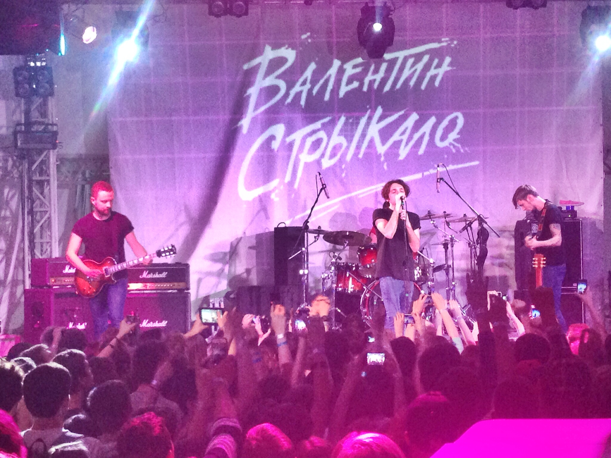 Валентин Стрыкало в Зелёном театре